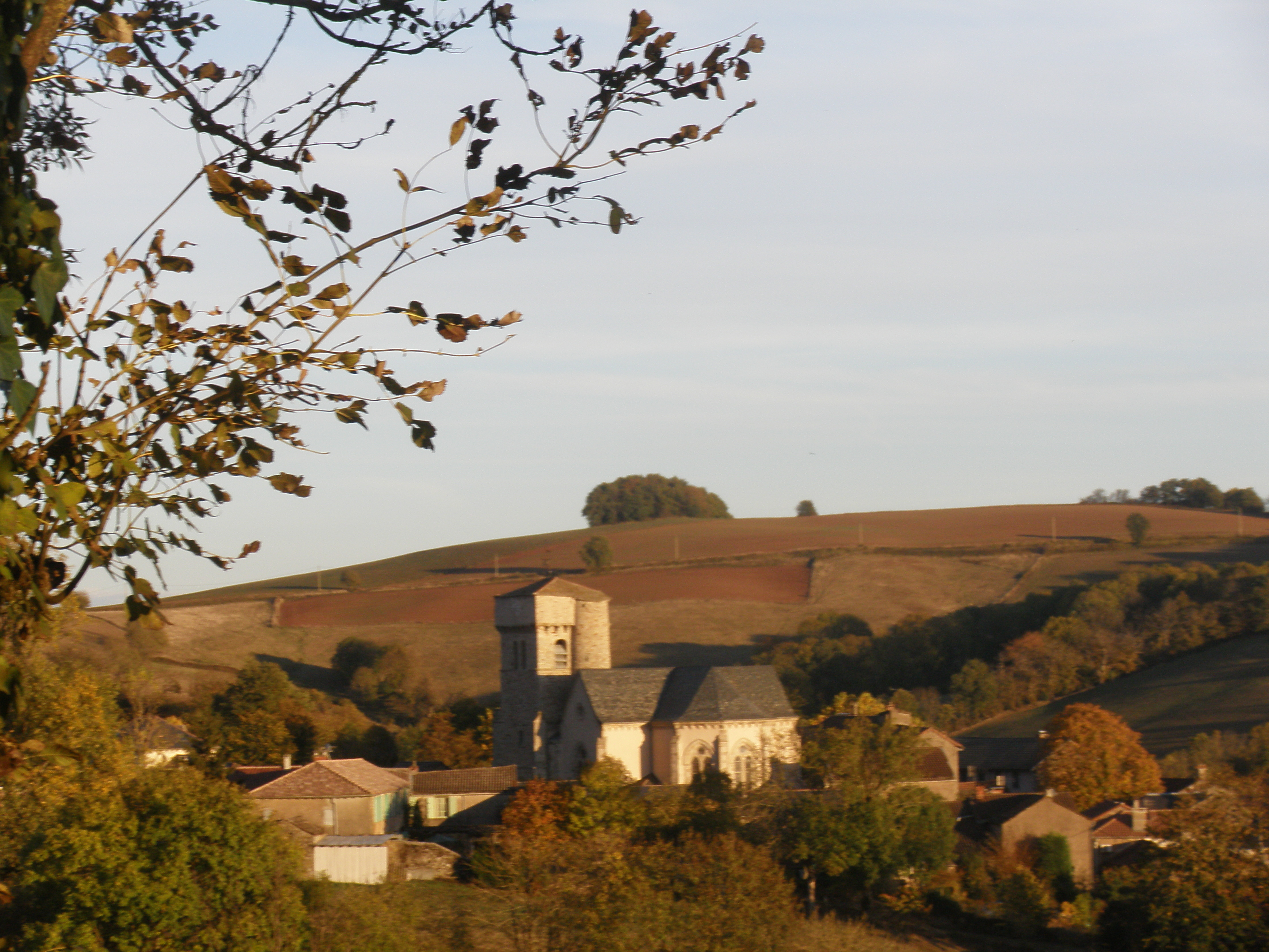 Vue générale de Martrin